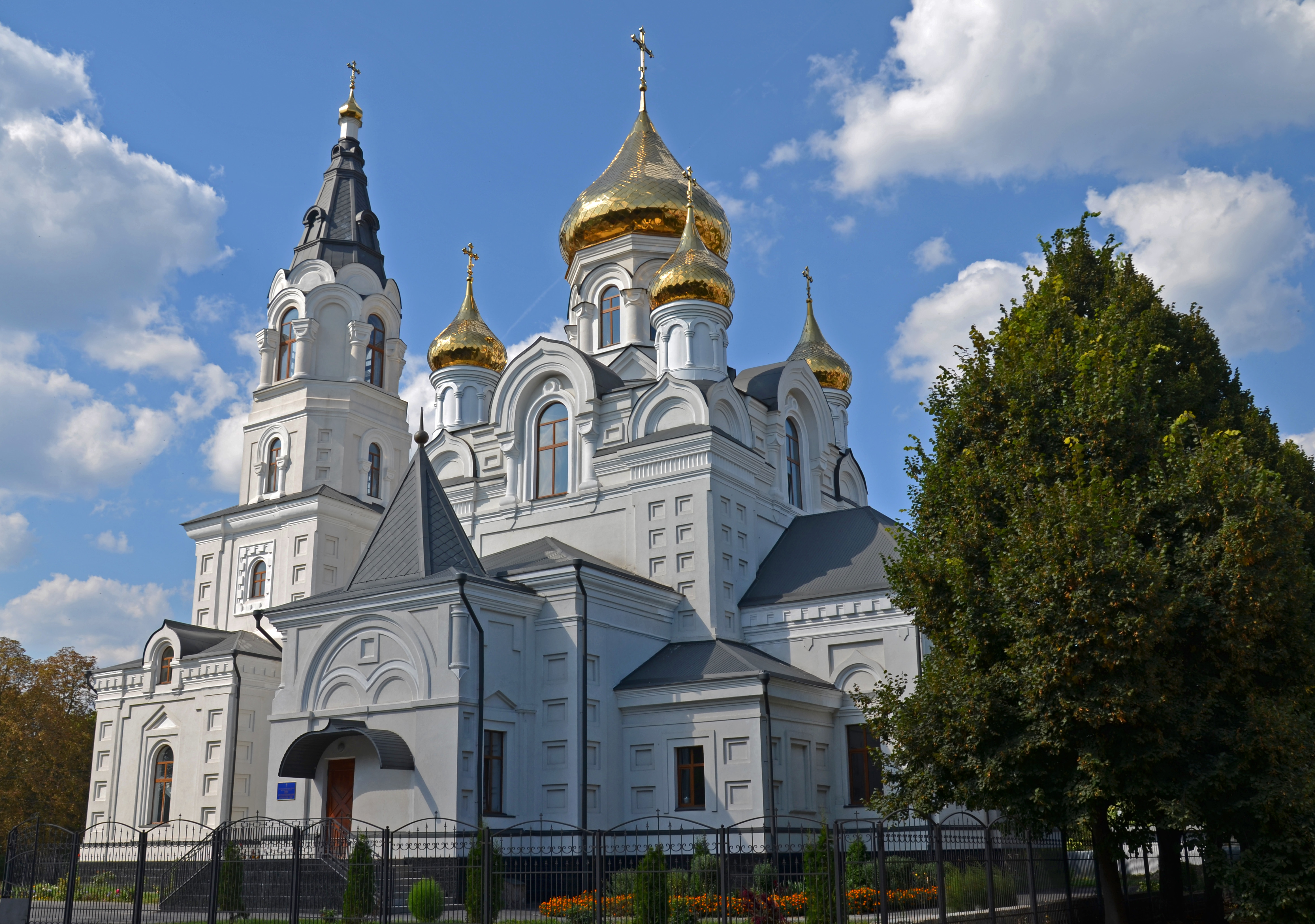 Хрестовоздвиженська Церква, Житомир, вул. Кафедральна, 18